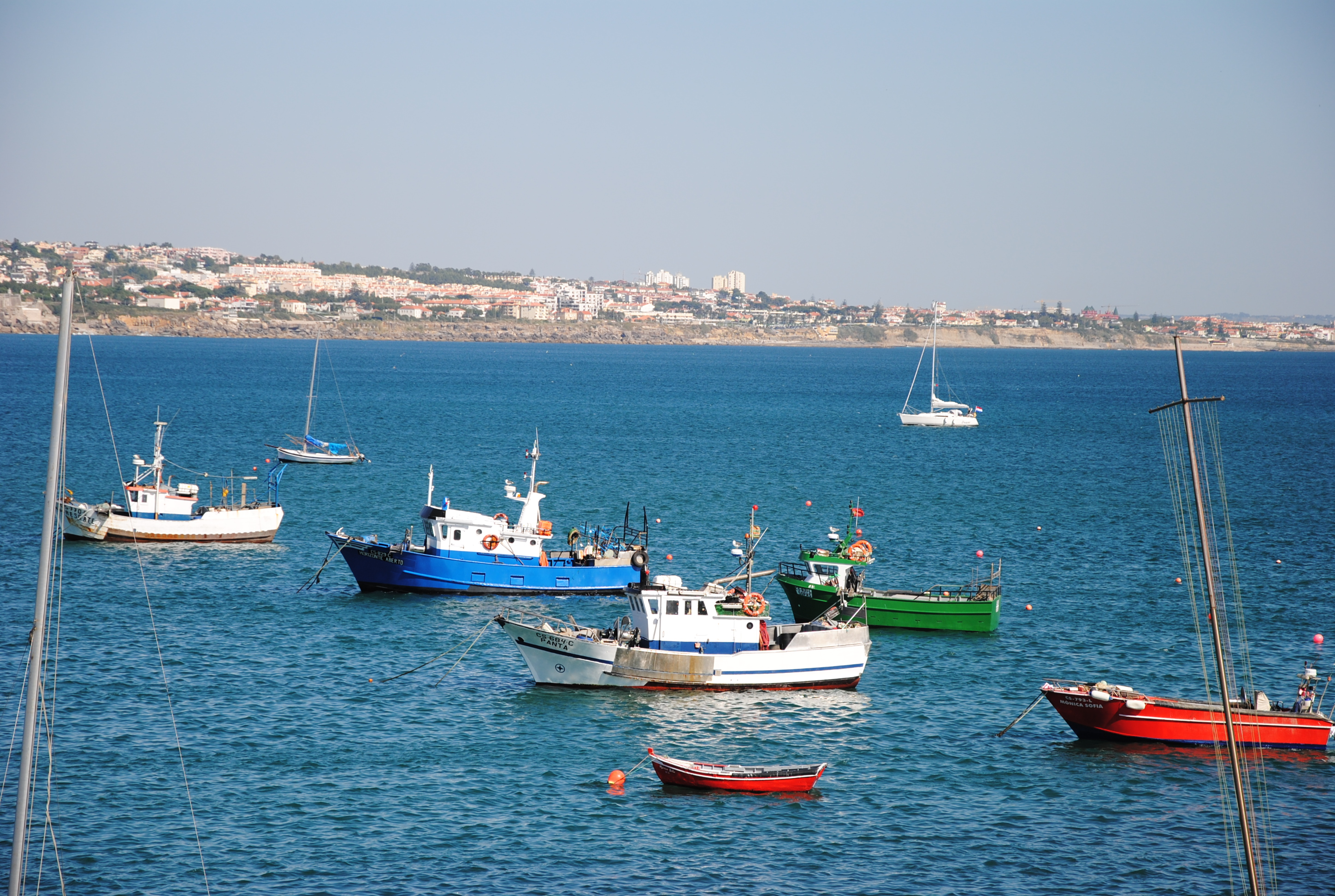 Vista de Cascais, Portugal.